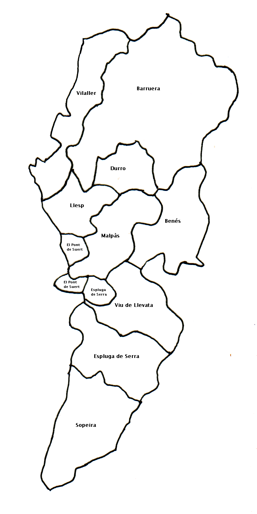 Mapa de l'Alta Ribagorça d'administració catalana definida el 1939 (Alta Ribagorça)